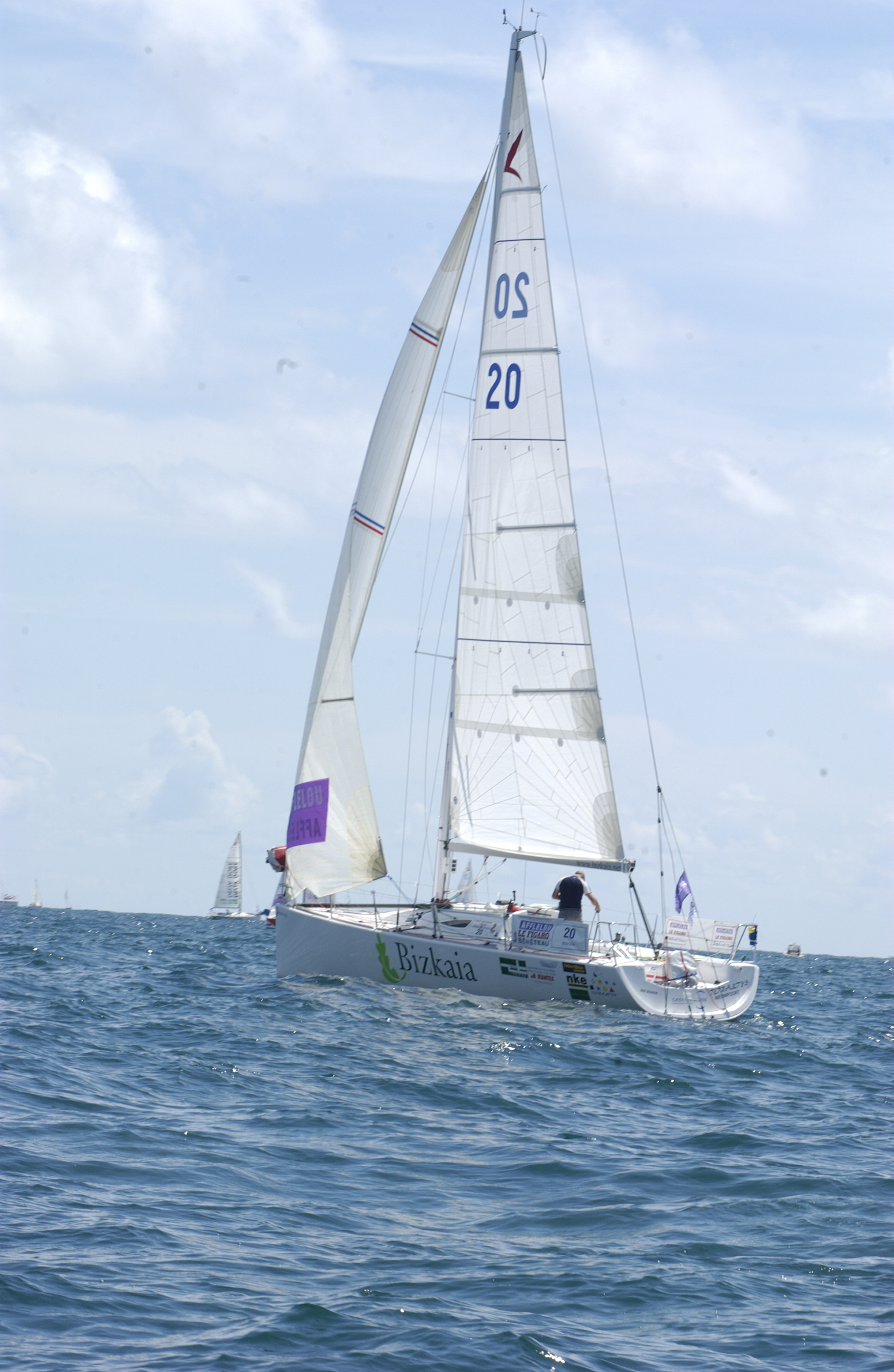 Velero Bizkaia, patroneado por Unai Basurko en la salida de la regata La Solitaire, en Sables d'Oronne (Francia), 28 de julio de 2003.